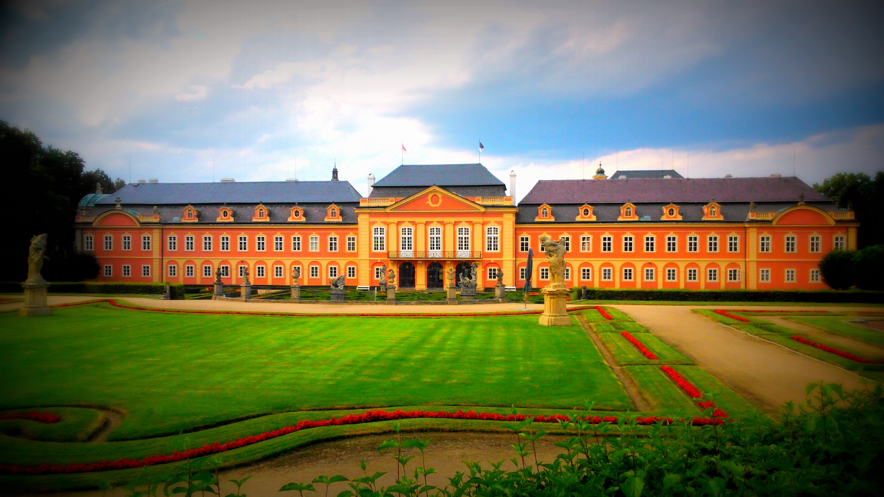 zámek dobříš